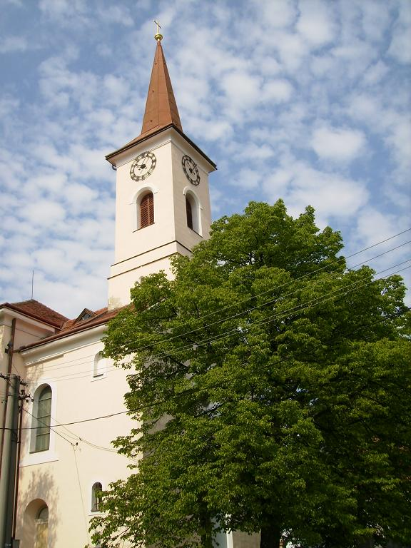 Kostel v Otnicích